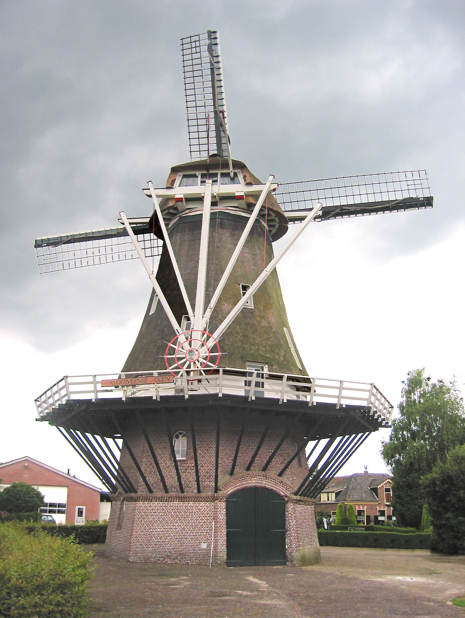 Walderveensemolen in Walderveen, Gelderland, the Netherlands